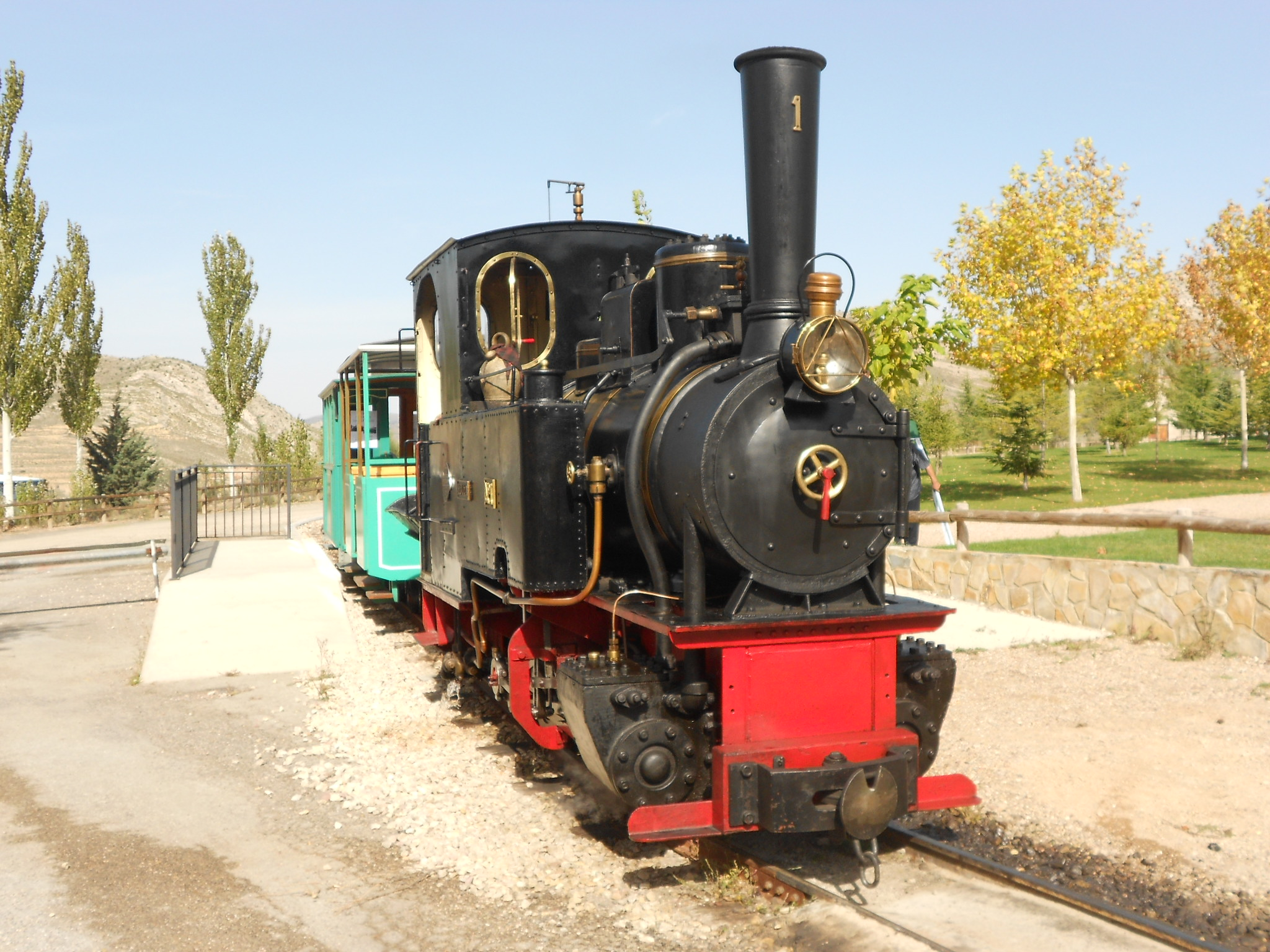 Ferrocarril minero turístico (Utrillas, España)